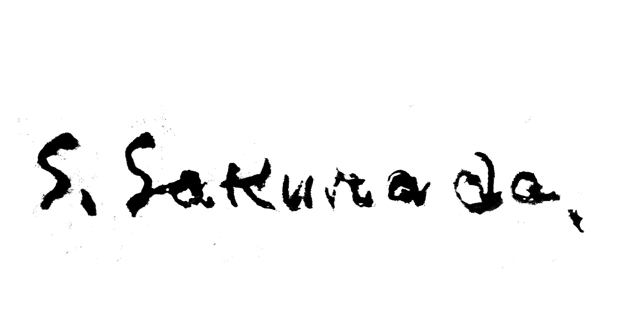 桜田精一画伯のサイン